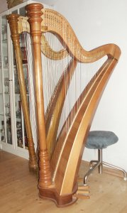 Tiroler Volksharfen von Bradl und Mürnseer